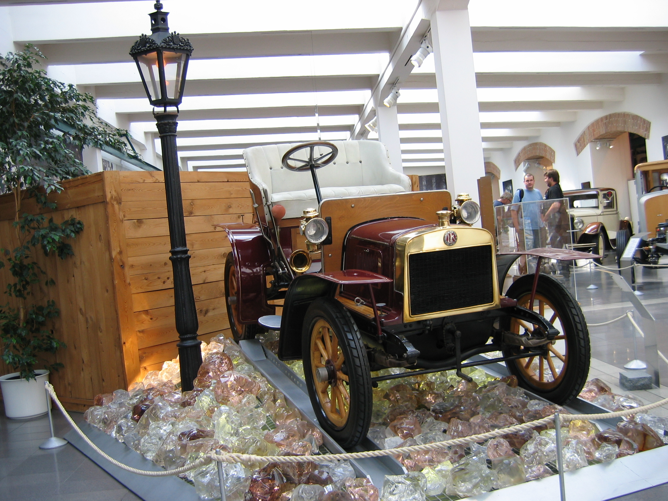 1905 LAURIN & KLEMENT A - Škoda Auto Museum, Mlada Boleslav